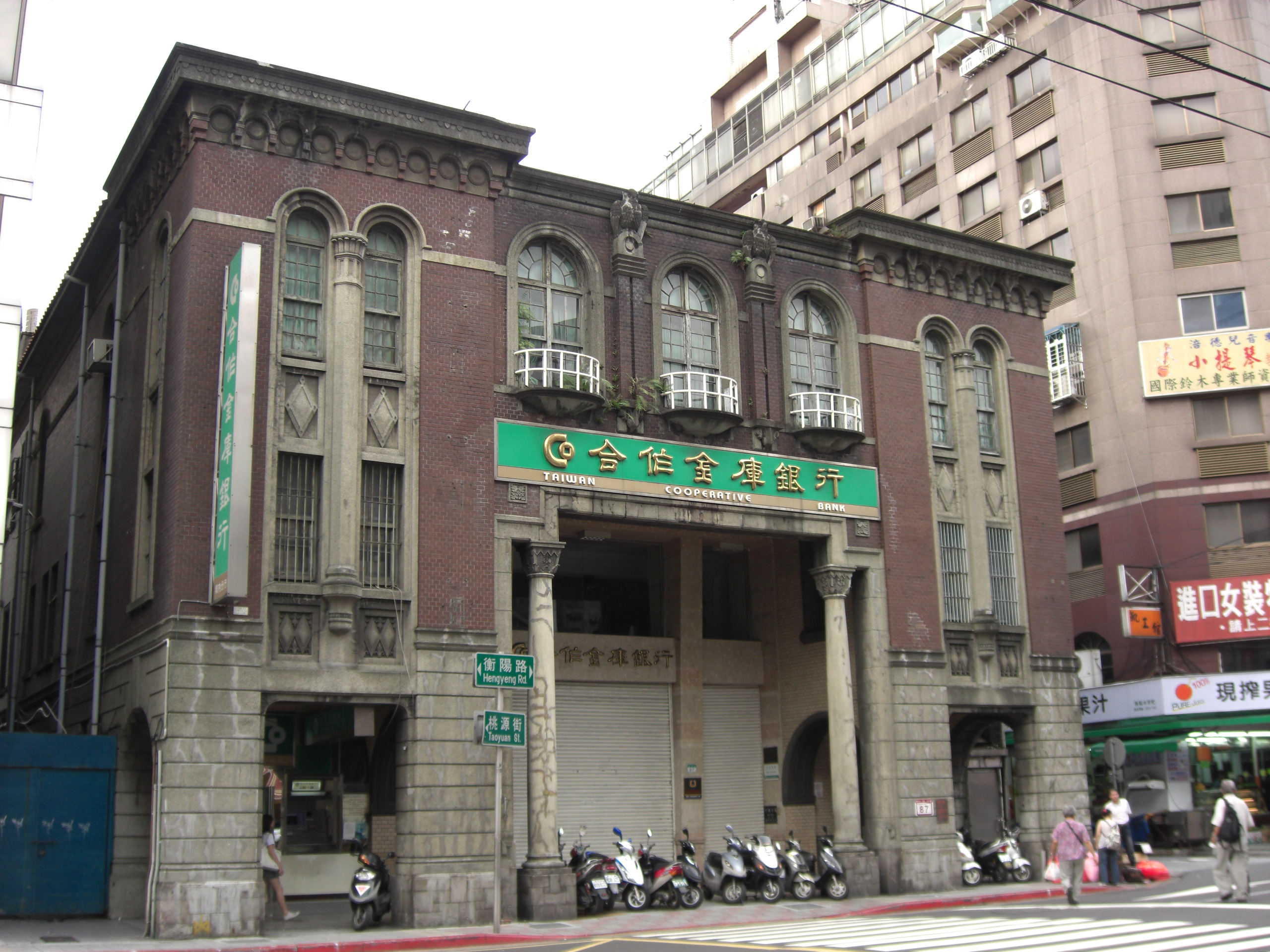 合作金庫銀行城內分行，位於臺北市中正區衡陽路87號（原臺北市第十信用合作社總社）。